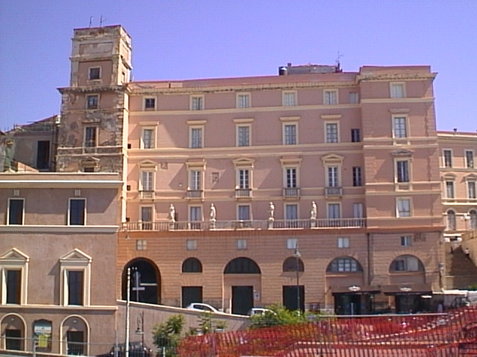 Palazzo Boyl, XIX secolo, Cagliari